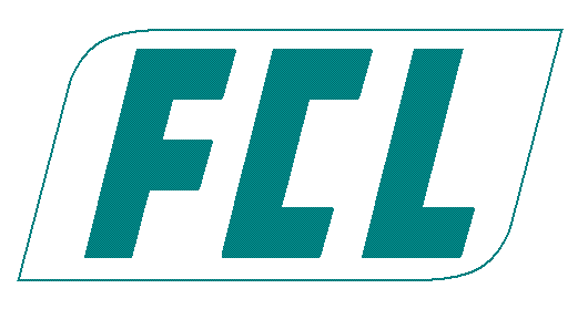 Logo delle Ferrovie Calabro Lucane